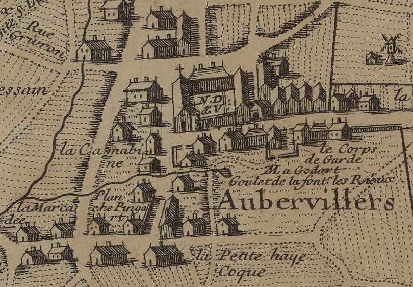 Eglise Notre-Dame des Vertus a Aubervilliers, sur le Plan du terroir de St-Denis en France et des paroisses de La Chapelle d'Aubervilliers, de la Cour Neuve, de Stains, de Pierrefitte, de Villetaneuse, d'Epinay et St-Ouen